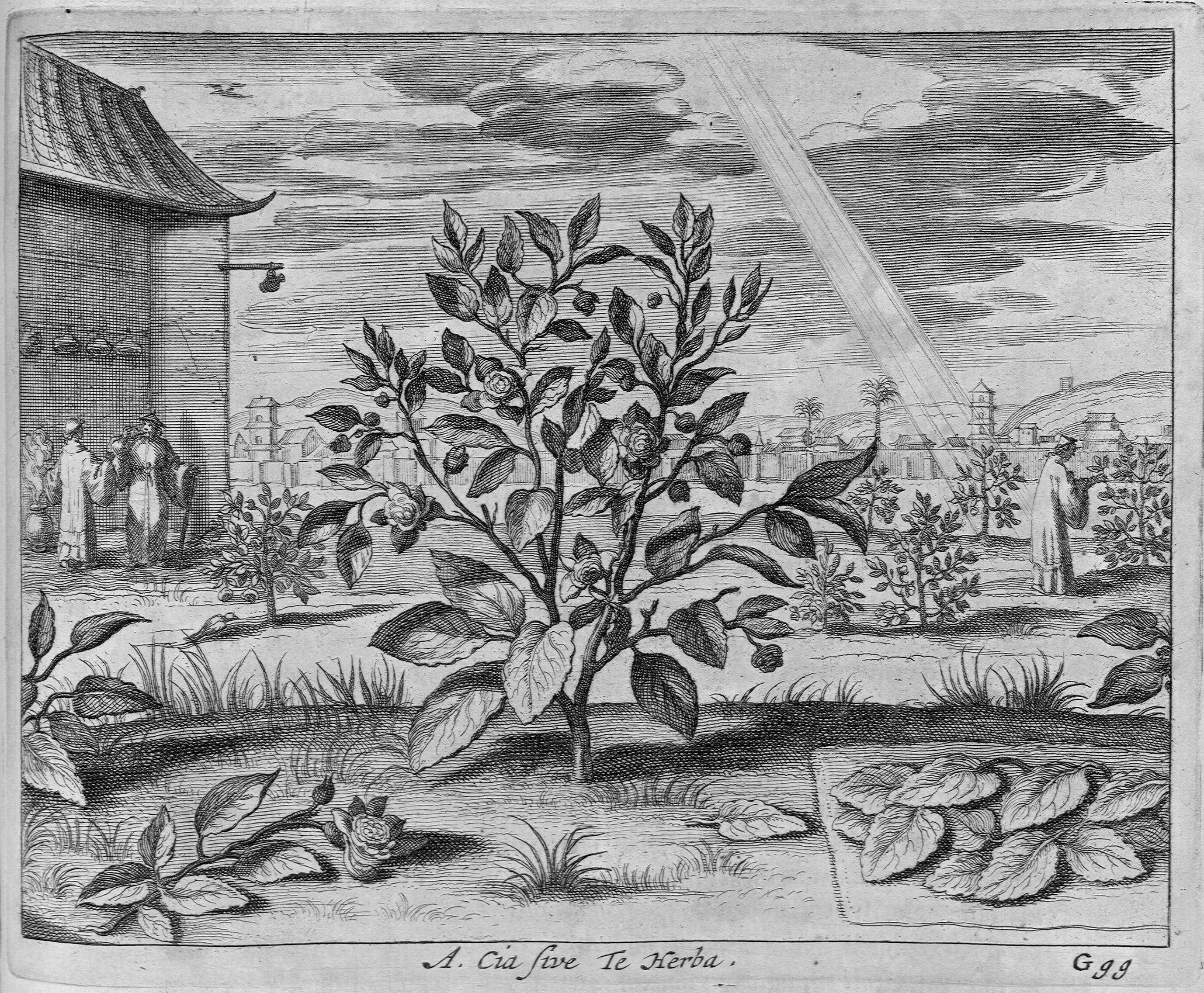 Autor: Kircher, Athanasius, (S.I.), 1602-1680 Descripción bibliográfica: Athanasii Kircheri... China monumentis : qua sacris quà profanis, nec non variis naturae & artis spectaculis, aliarumque rerum memorabilium argumentis illustrata ... - Amstelodami : Apud Joannem Janssonium à Waesberge & Elizeum Weyerstraet, 1667 . - [14], 237, [11] p., 24 lám. de grab., 2 mapas: il.; Fol.- Elenchus librorum a P. Athanasio Kirchero e Societate Jesu editorum (2H4). Al final del mismo: "Juxta exemplar Romae, typis Varesii ..." Materia: China - Descripciones y viajes Notas: Sign.: [Ast.]-2[Ast.]4, A-2H4. - Texto a dos col. - Port. con grab. con anagrama de la Compañía de Jesús . - Precede a la port. lám. de grab. alegórico. Precede al Fol. I retrato grab. del autor. - Las h. de grab. calc., 3 de ellas pleg. (dos mapas e inscripción en caracteres chinos), las 23 restantes son: un retrato del autor, Inscripciones siríacas y sánscritas, personajes y vestimenta mogoles, tártaros y chinos, etc. - Las il. calc. intercaladas en el texto son escenas costumbristas y fauna y flora de China Impresor: Janssonius van Waesberge, Johannes, fl. 1642-1681, imp. Impresor: Weyerstraet, Elisée, imp. Lugar de impresión: Holanda. Amsterdam Localización: Vea la ilustración en su contexto Libro completo en pdf